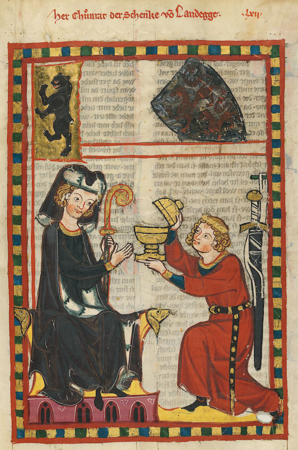 Codex Manesse, UB Heidelberg, Cod. Pal. germ. 848, fol. 205r: Herr Konrad, der Schenk von Landeck